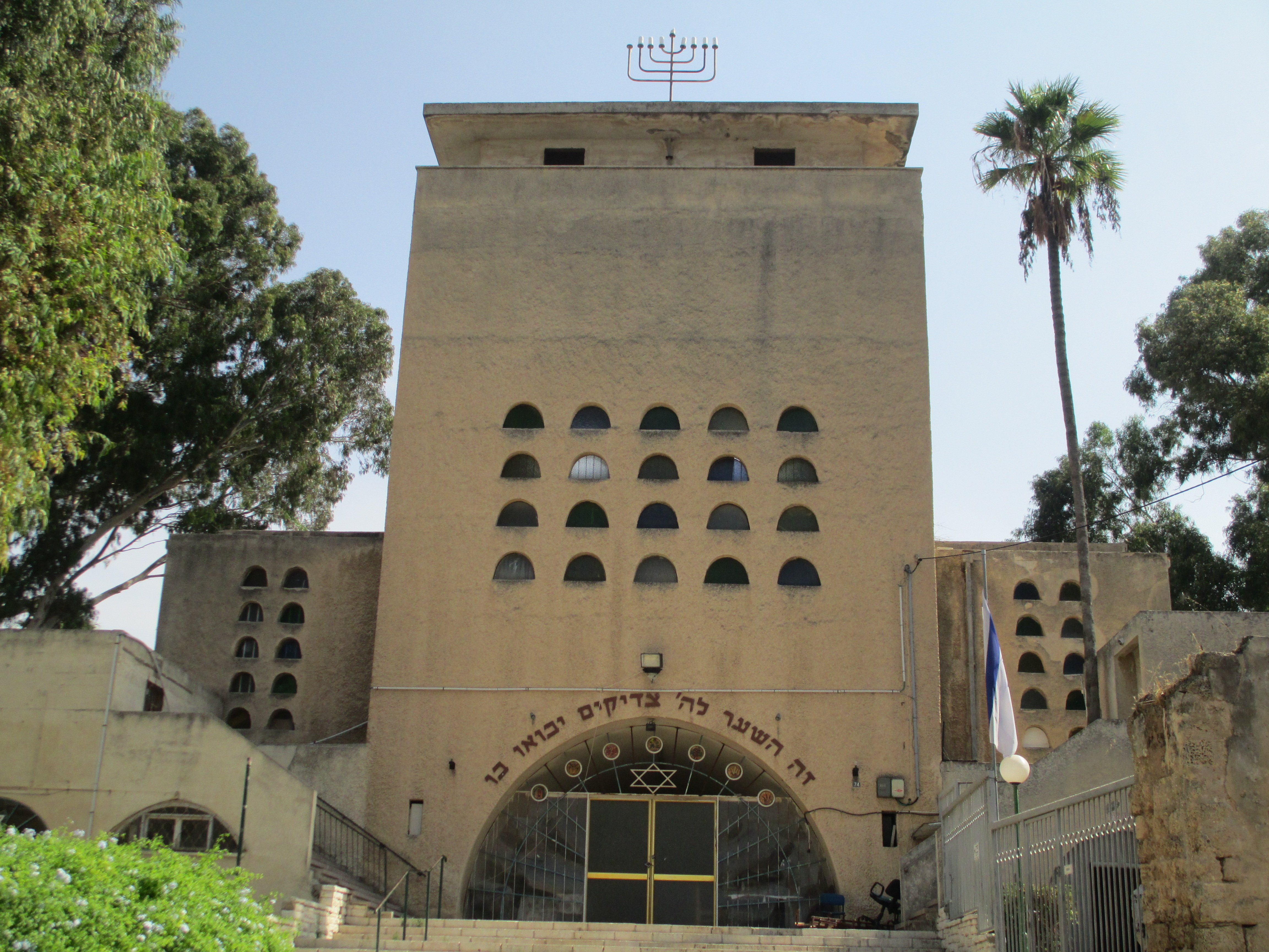 בית הכנסת הגדול בחדרה